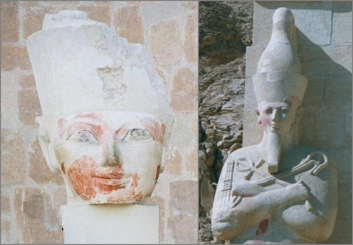 Hatshepsut, ex enwiki